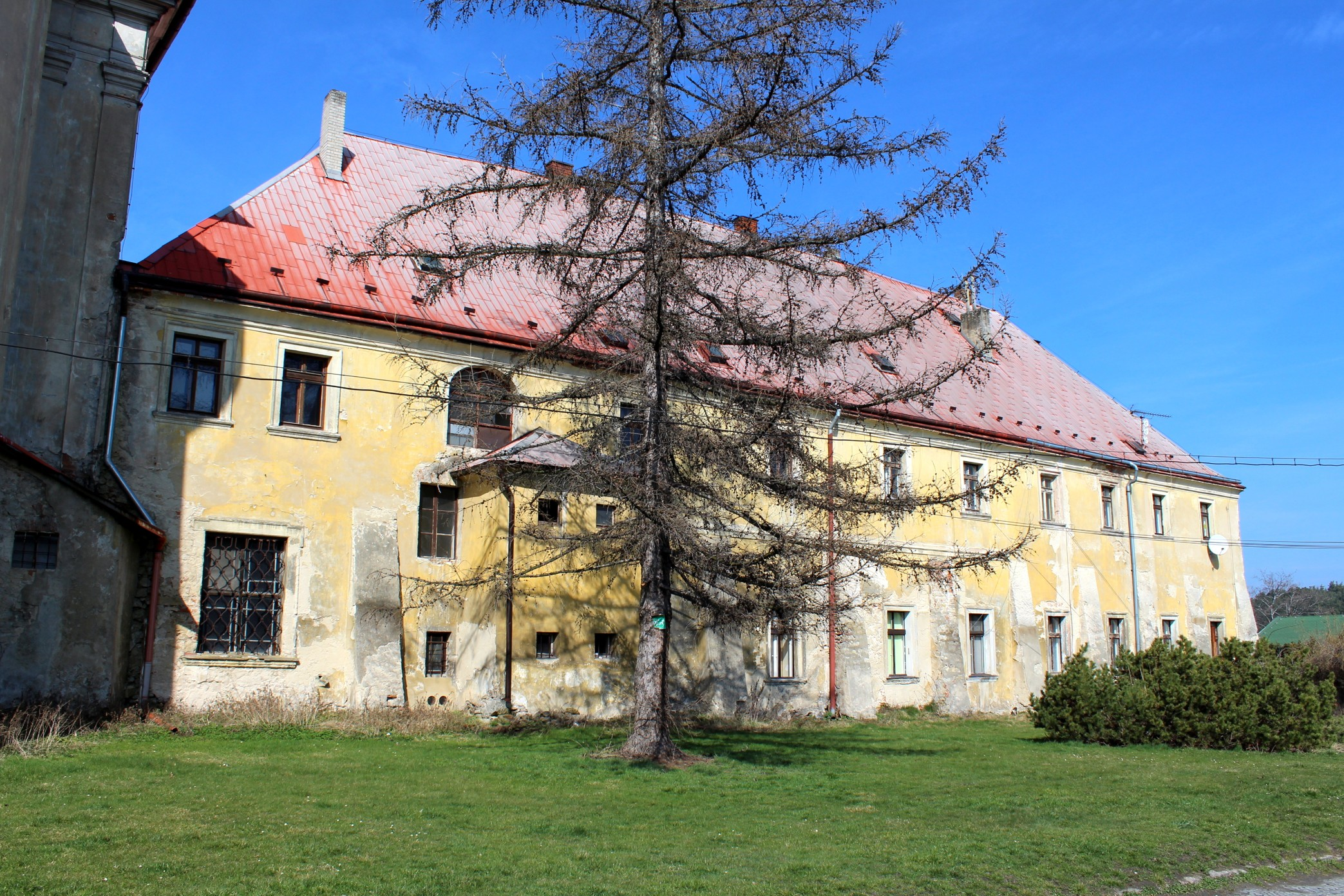 Bělá pod Bězdězem, Augustiniánský klášter